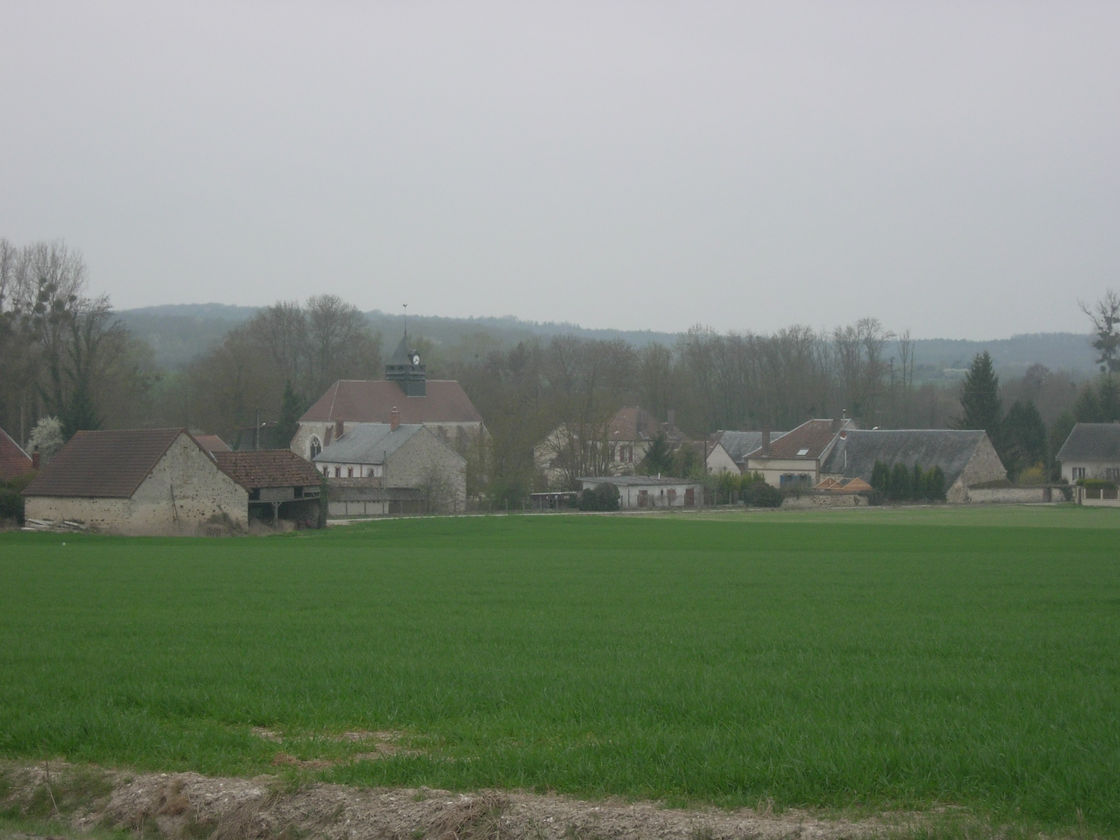 Saint-Loup-de-Buffigny